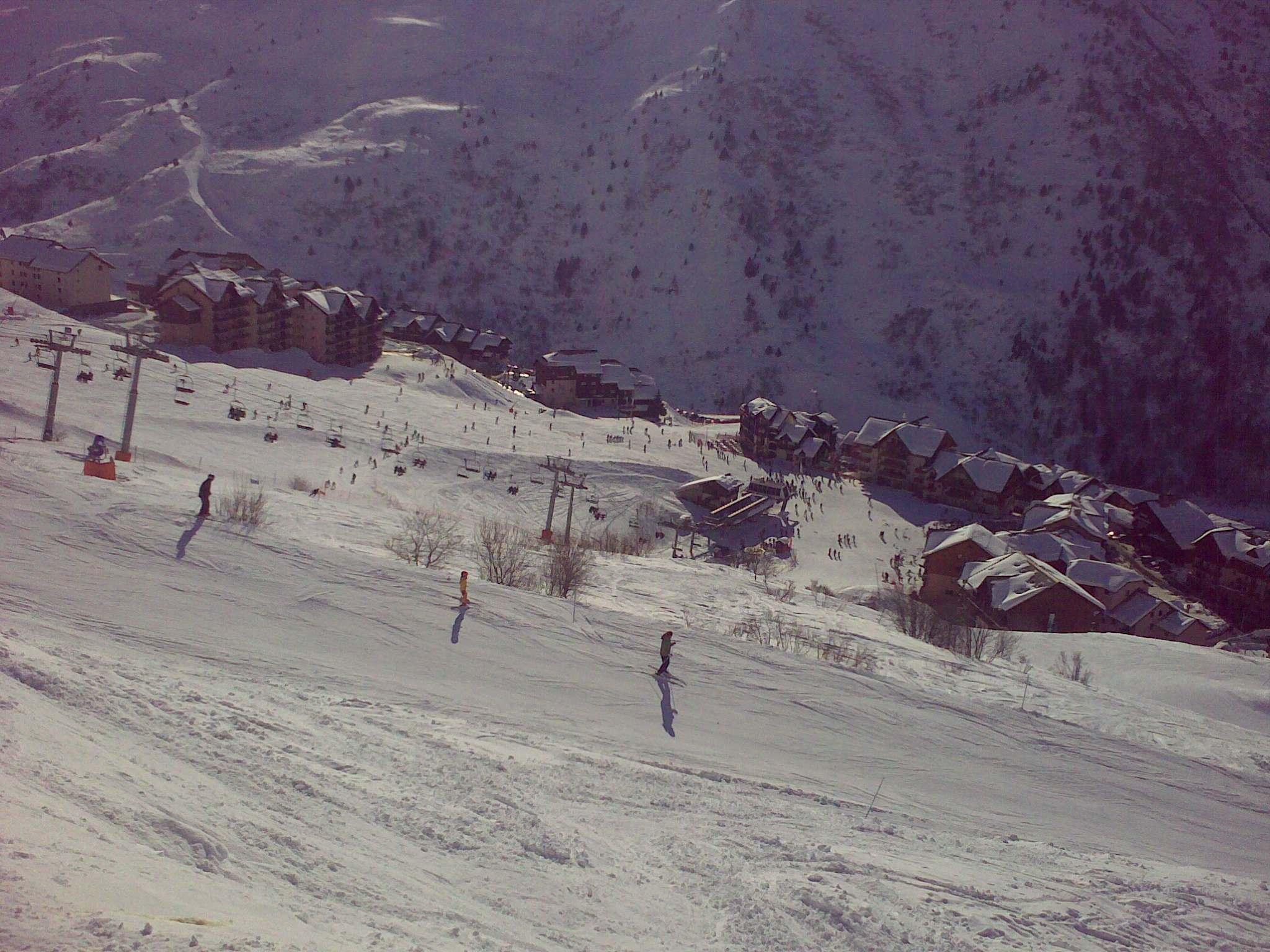 Le front de neige de Valmeinier, vu du dessus.